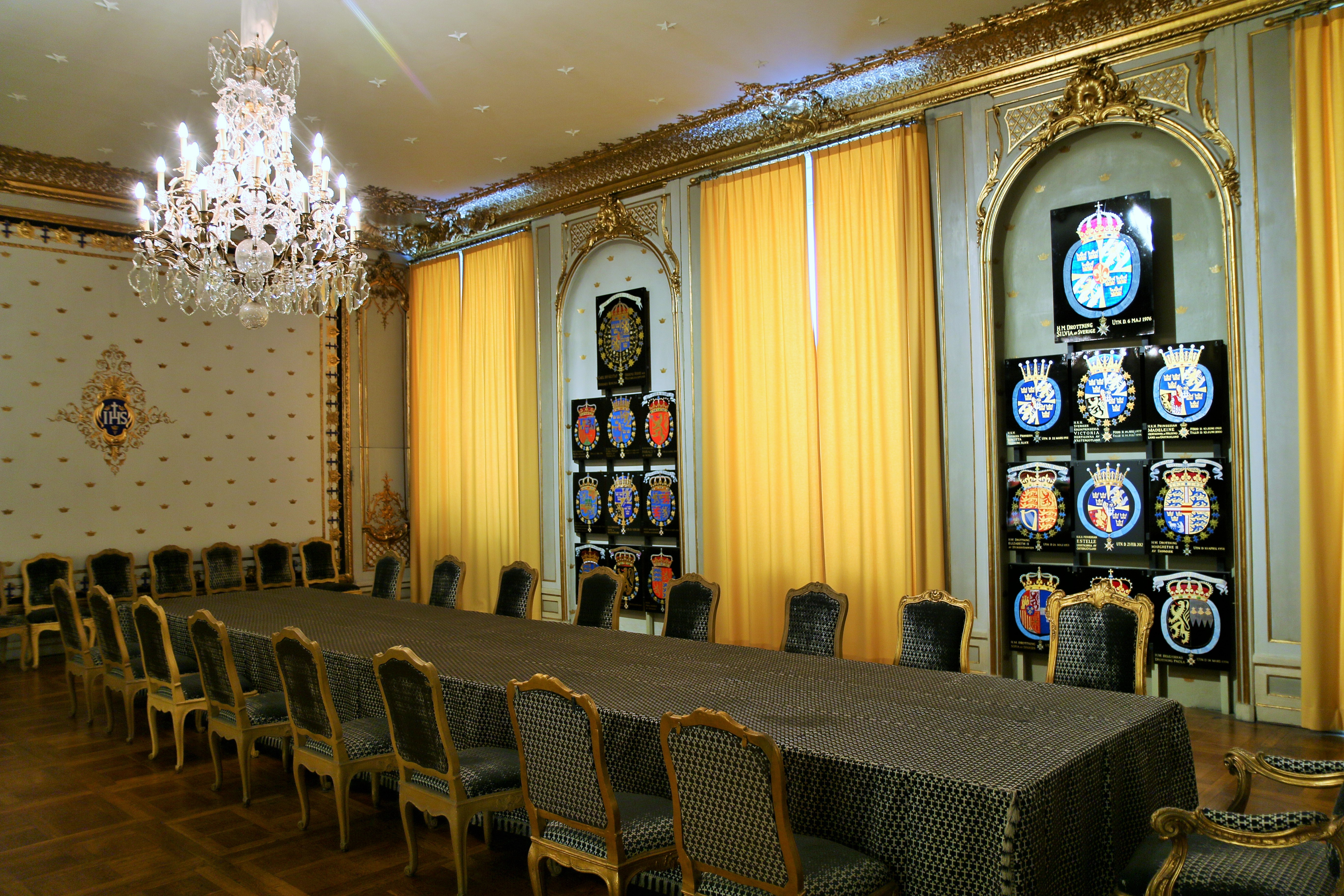 Longue table au Palais Royal de Stockholm.